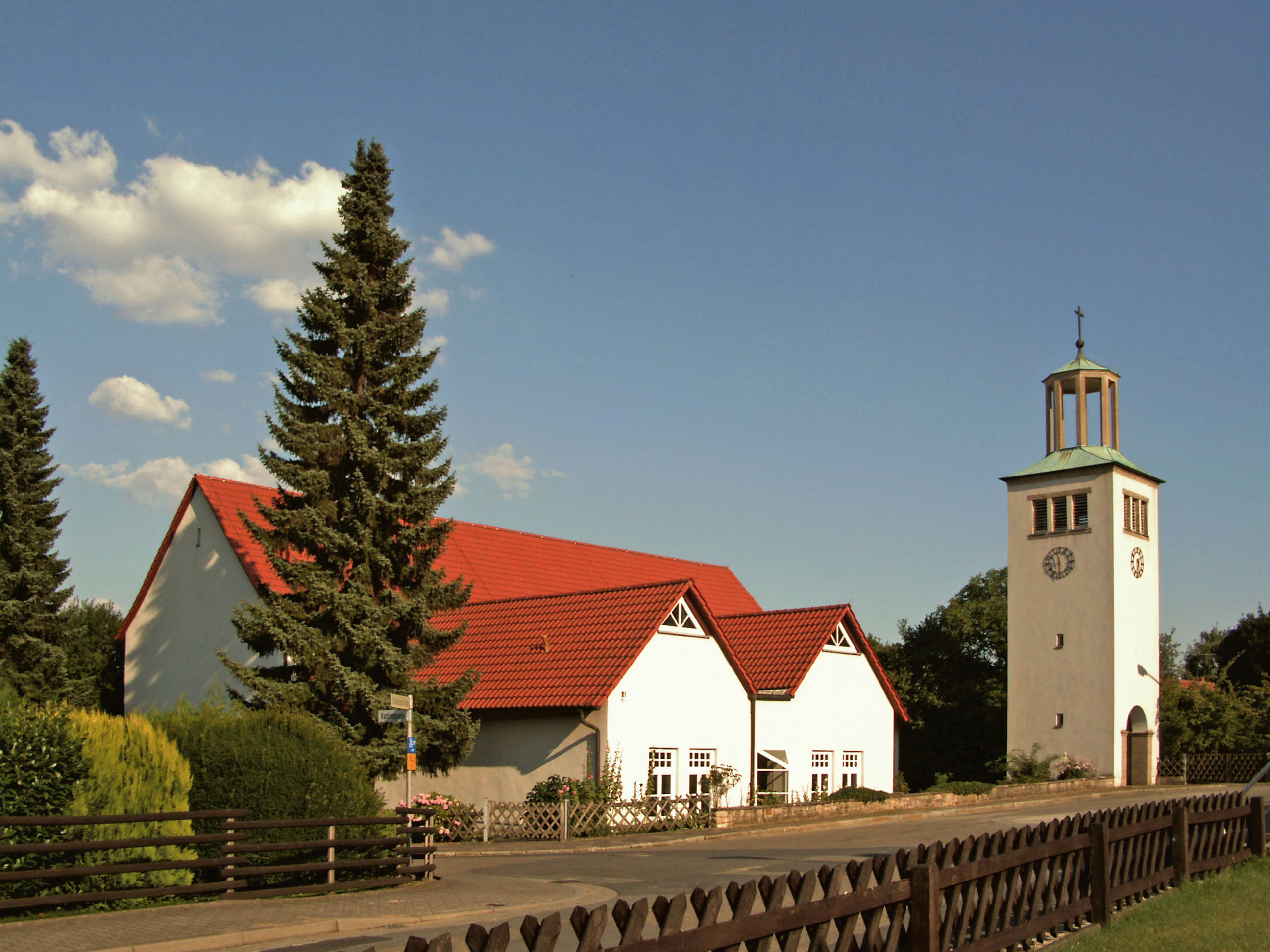 Katholische Kirche St. Barbara in Neu Büddenstedt, Landkreis Helmstedt